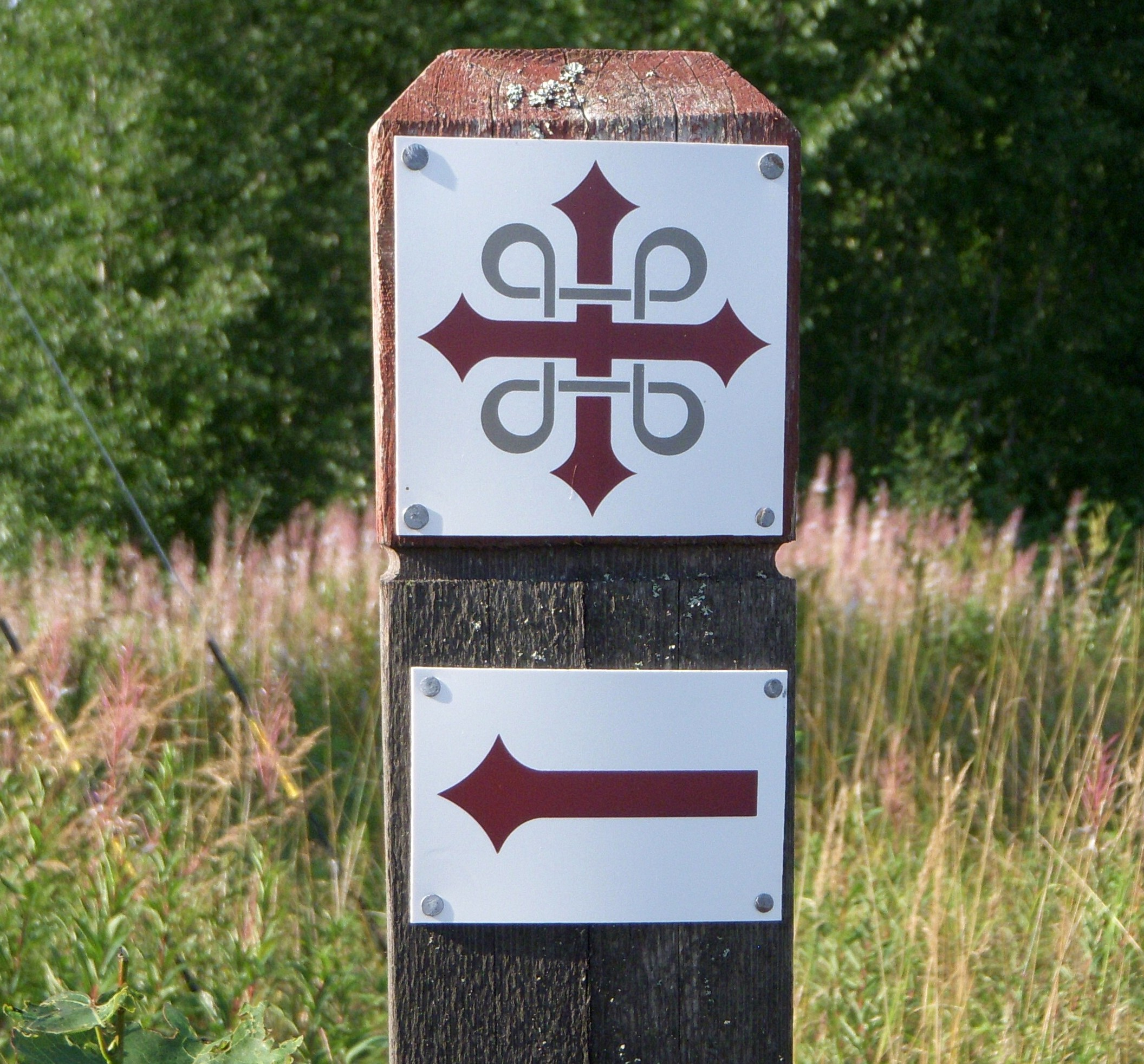 Markering för "Pilgrimsleden Västerbergslagen" (vid Nyhammar). Symbolen är gemensam för Nidarosvägarna.